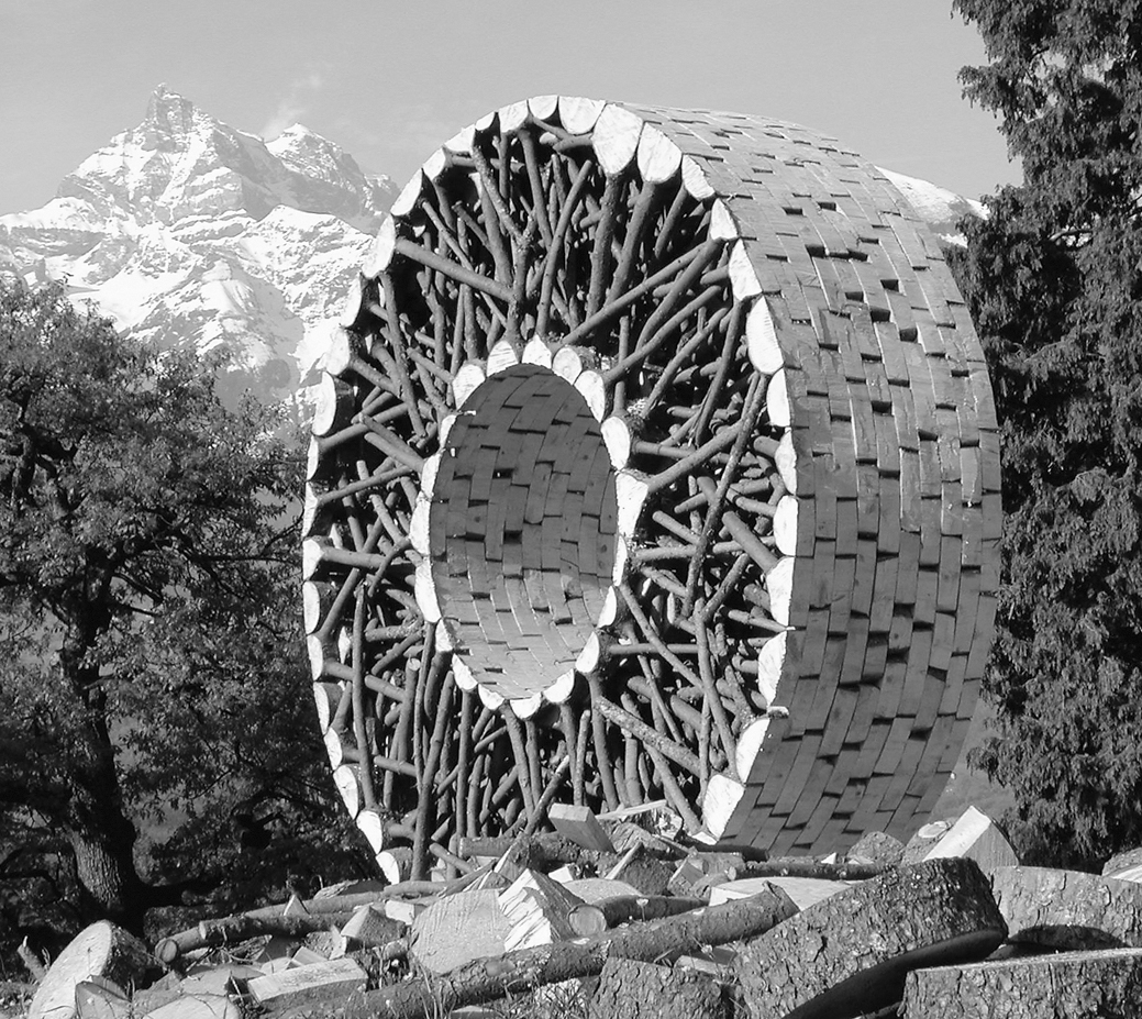 30 Kronen von alten Fichten in gleich dicke Stammscheiben zersägt, so dass die Äste noch mit den Scheiben verbunden sind. Mit Nägeln und Schrauben zu dem Ring zusammengebaut. (für die 8. Triennale de Sculpture contemporaine, Bex & Arts, 2002)